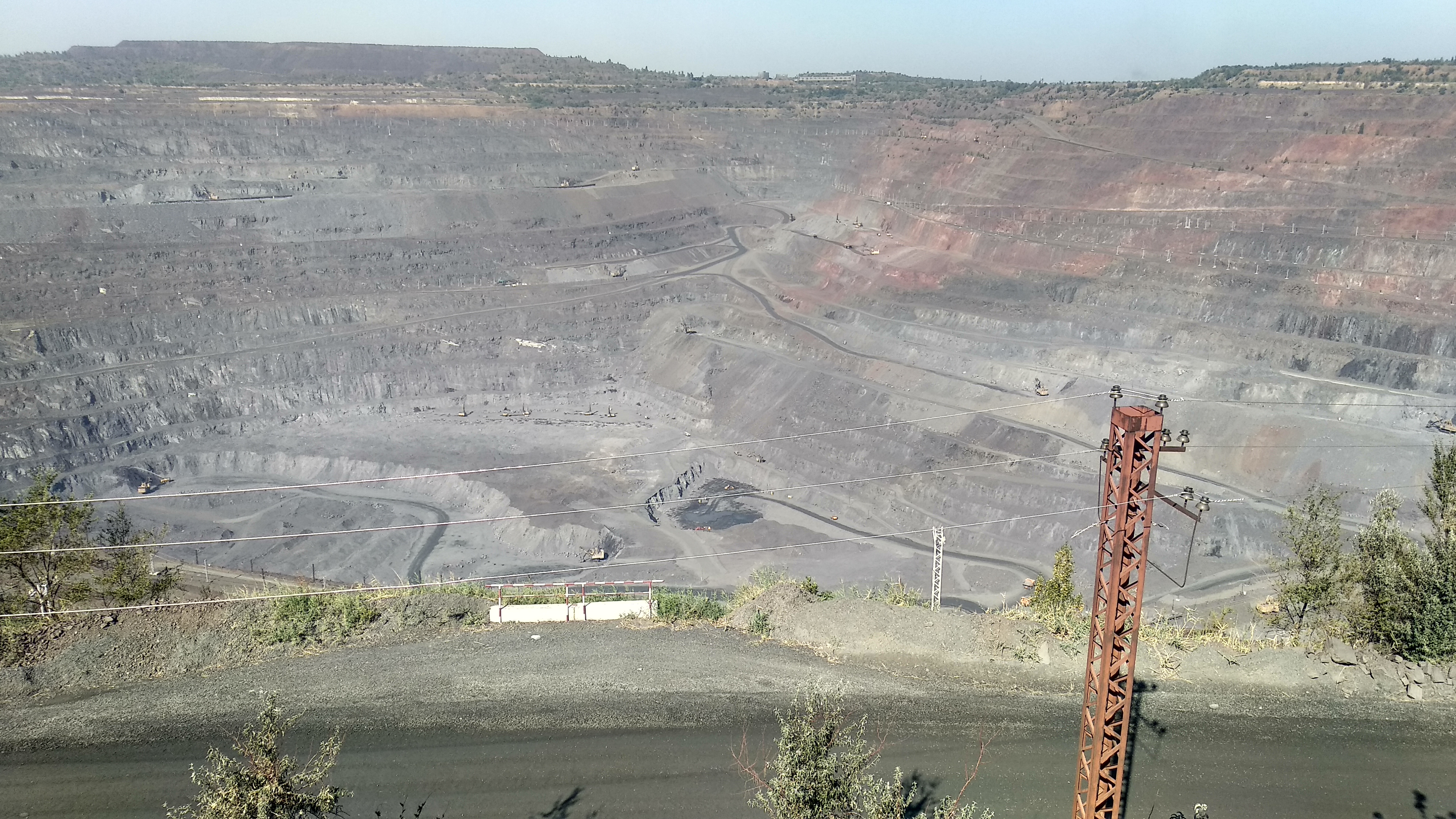 Фотография с смотровой площадки ЮГОКа